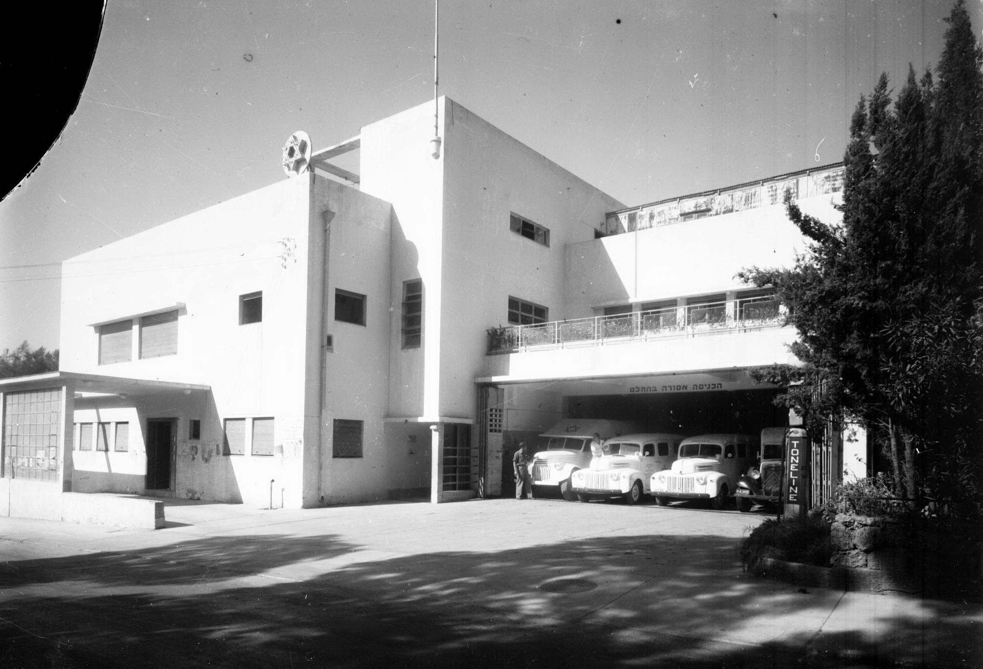 אוסף צילומים של הצלם זולטן קלוגר טווח מספרי התשלילים 30100 - 30183: בניין מגן דוד אדום